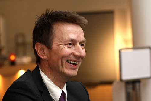 Hans Kristian Amundsen